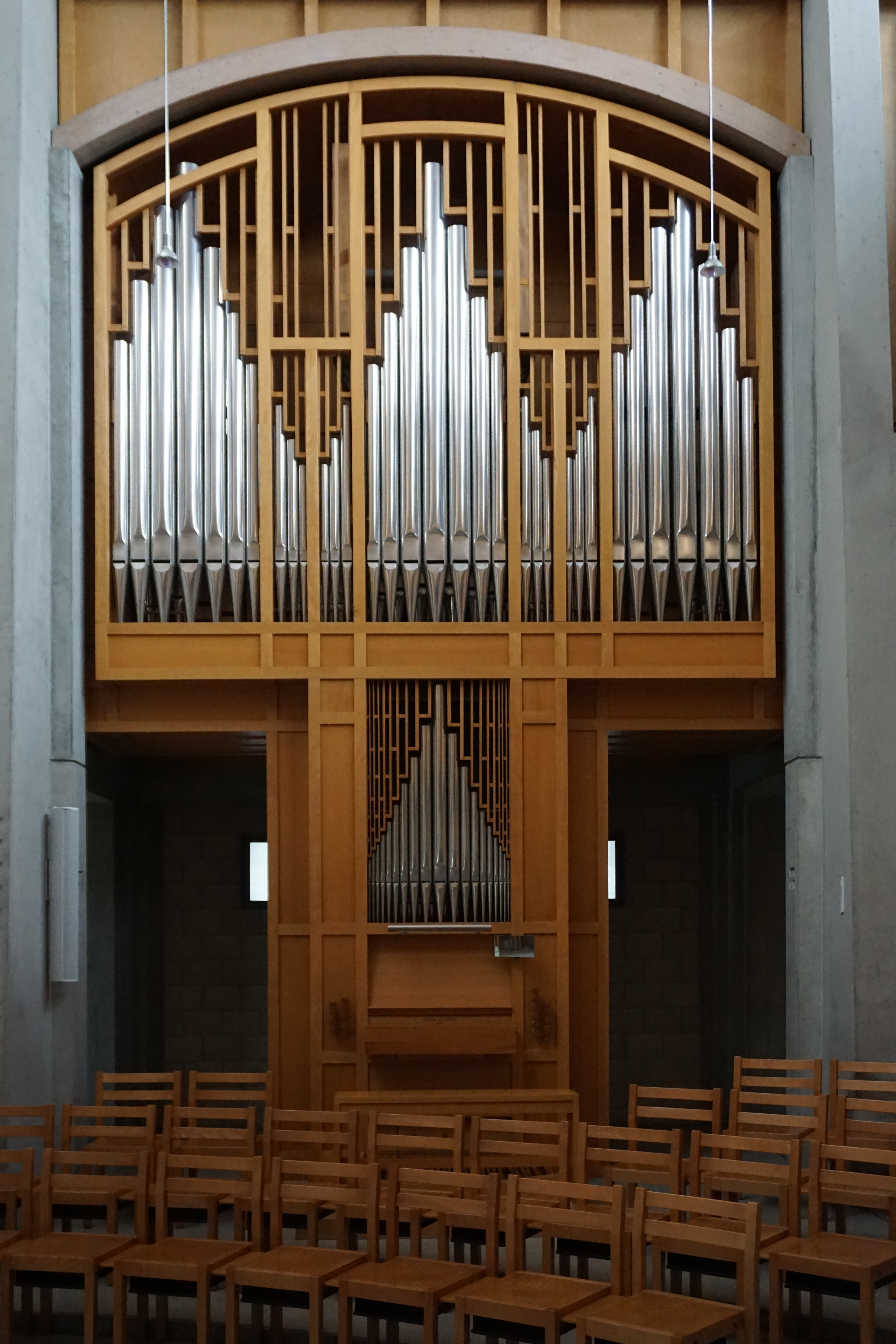 St. Mauritius, Orgel